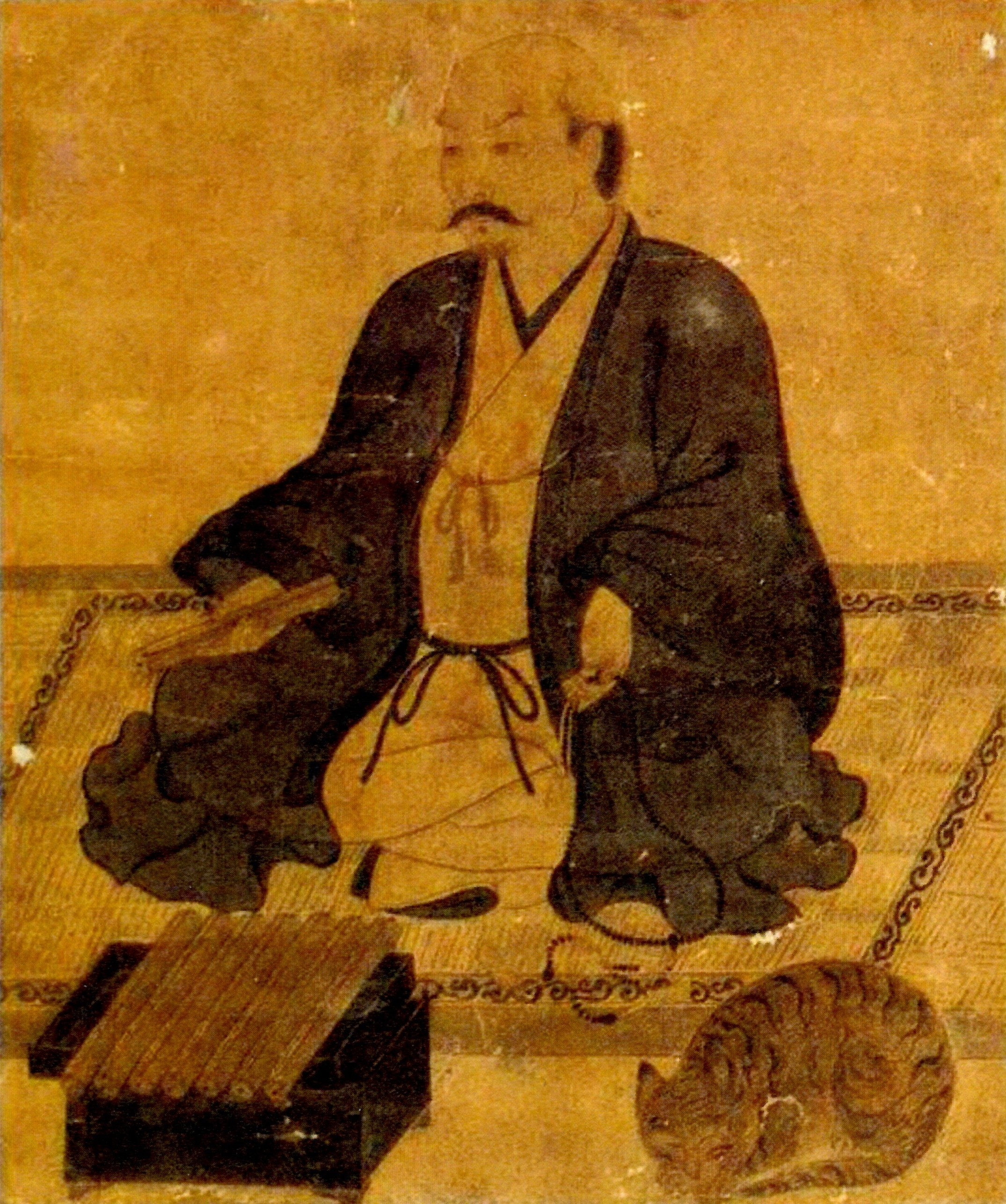 小田氏16代当主・小田氏治の肖像画。